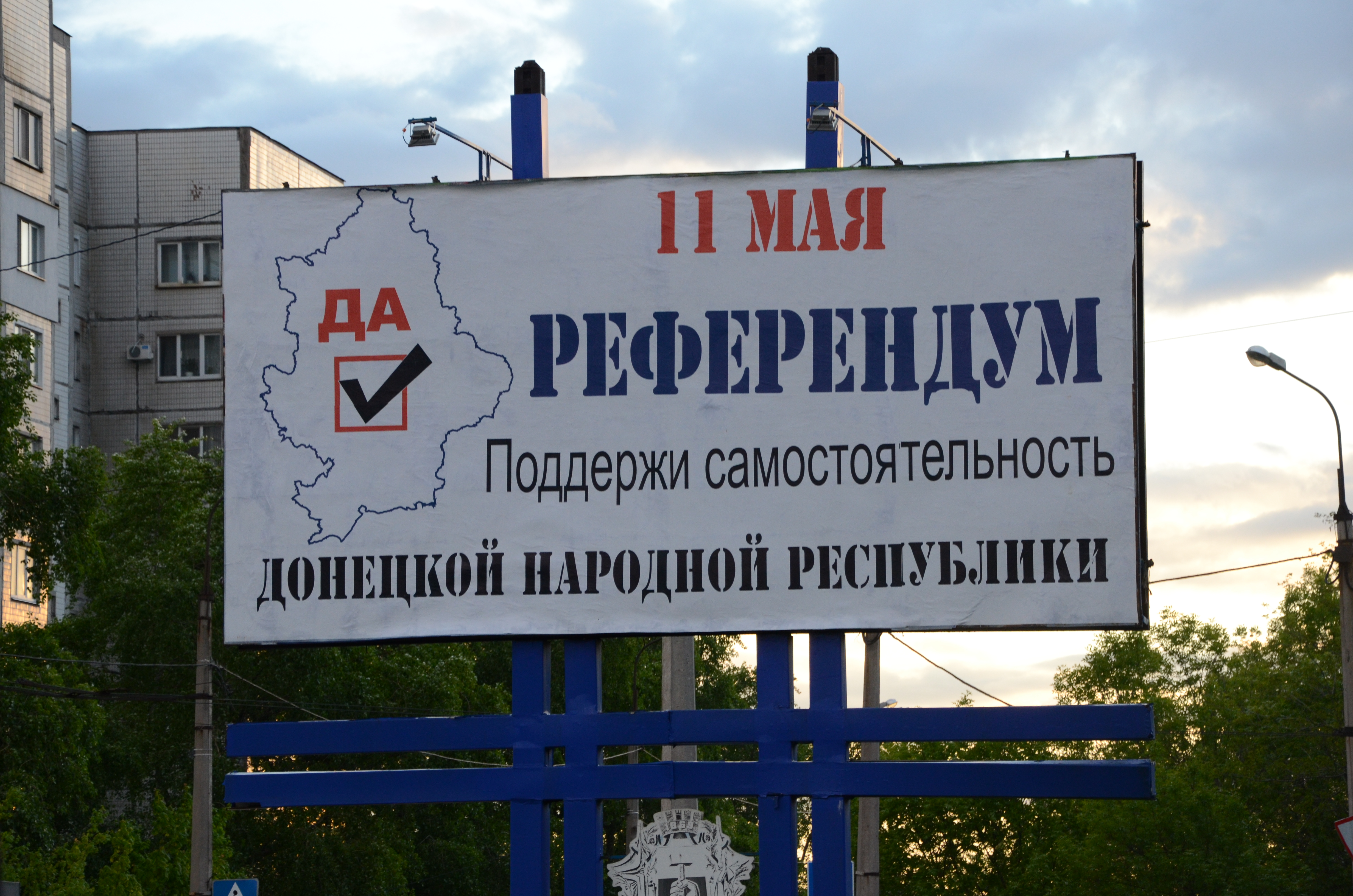 Протесты в Донецке